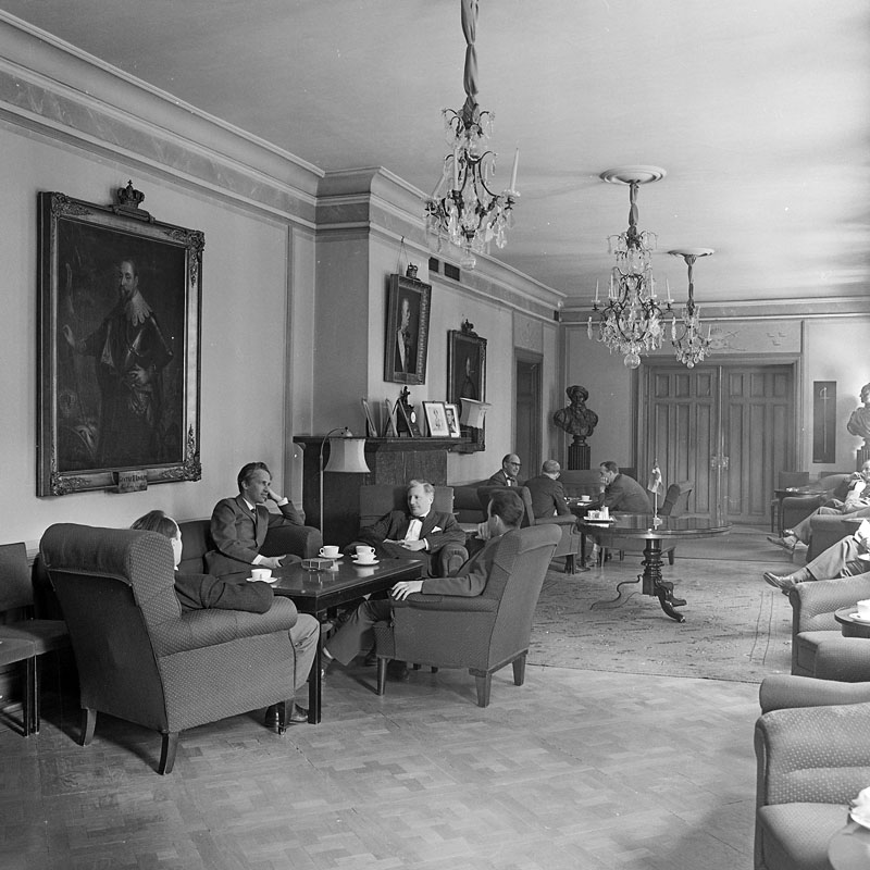 Militärsällskapet, Linnégatan 5. Interiör. Publicerat av: Stockholms stadsmuseum.